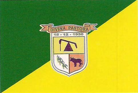 Bandeira do município de Divina Pastora